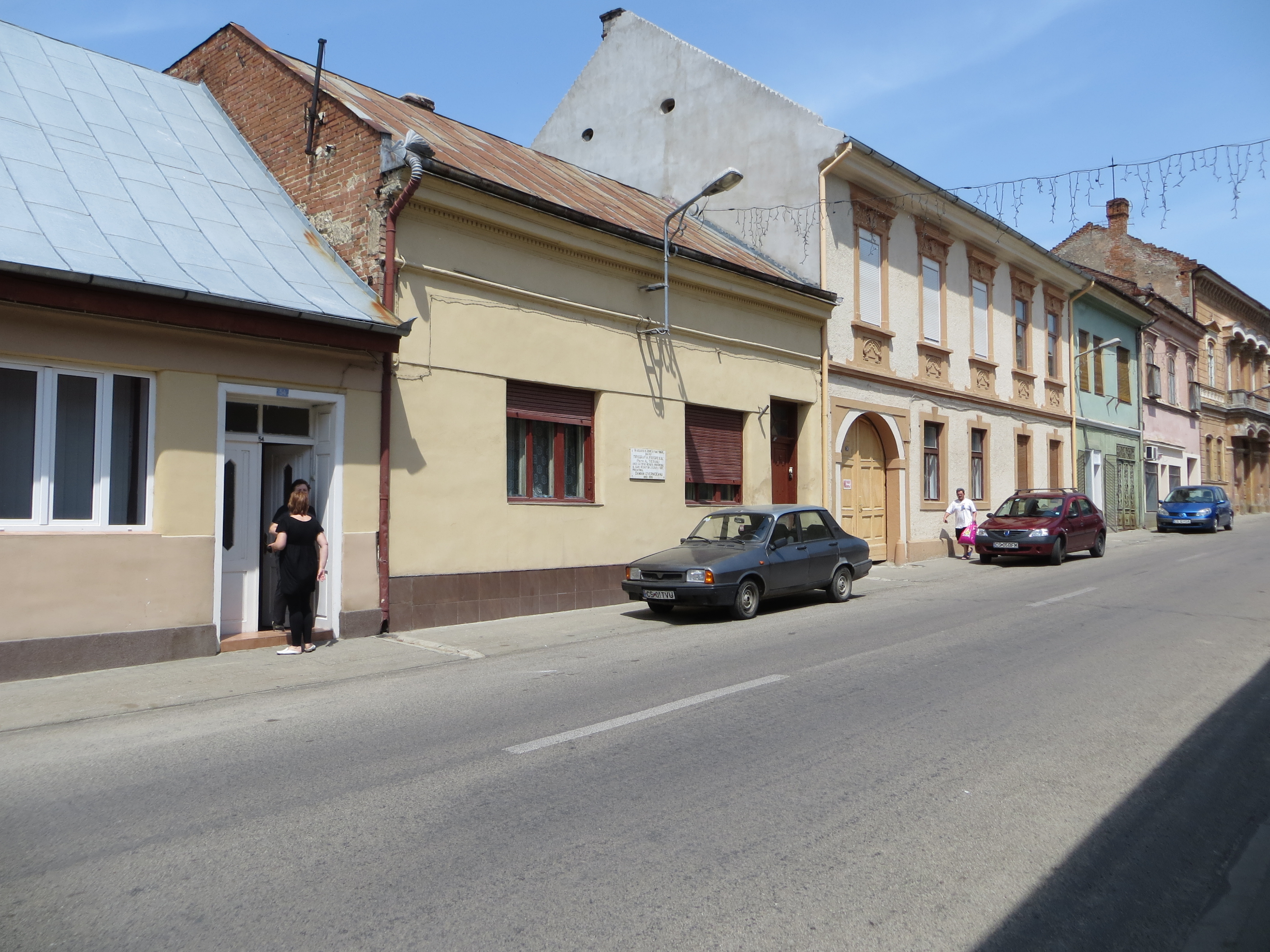 Casă oficiali UDR, cu tipografie, azi birouri